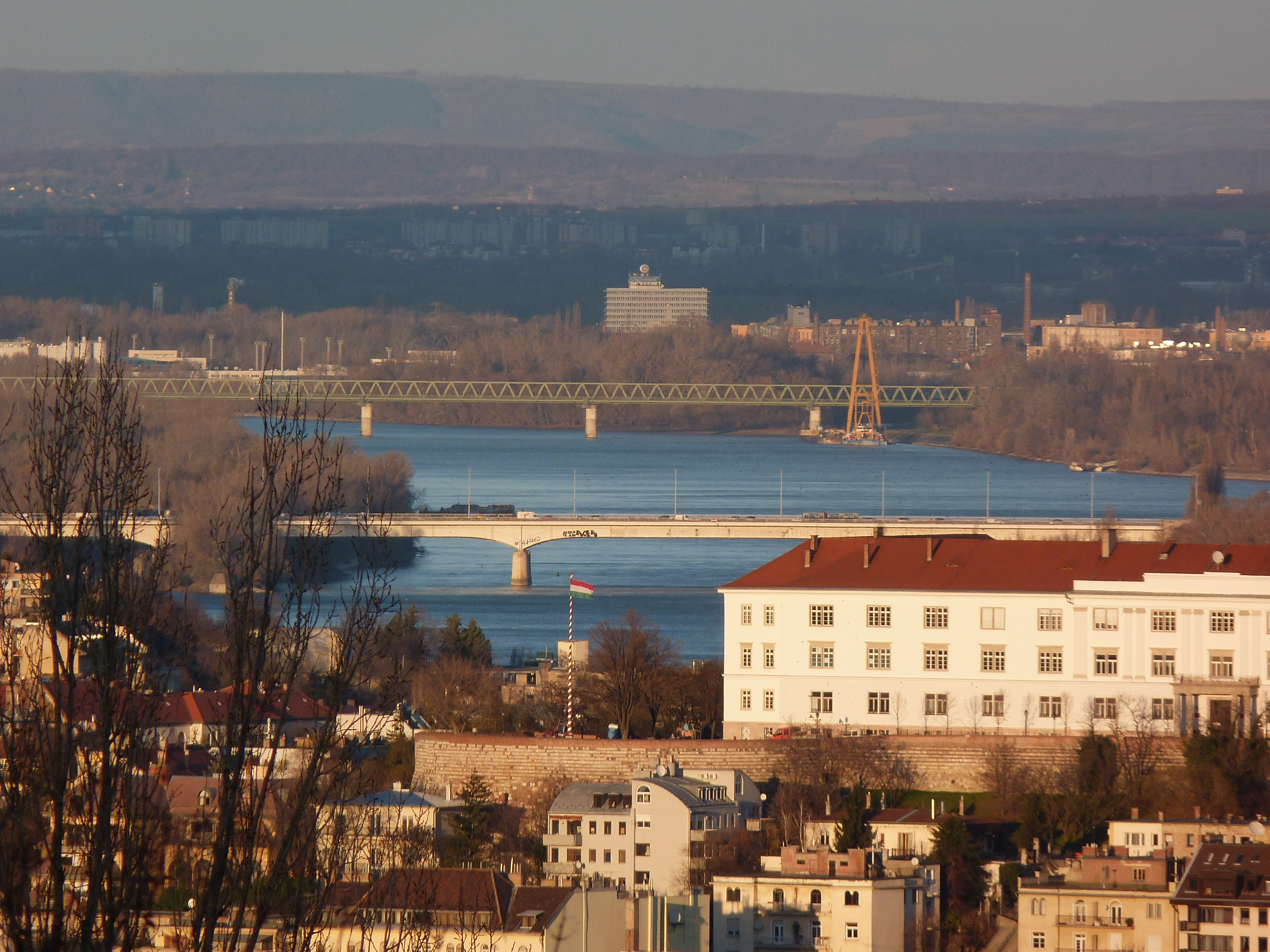 A felvétel 2013. december 6 -án pénteken készült Budapesten. Várnegyed, Hadtörténeti Múzeum. Háttérben a Duna. ©© Derzsi Elekes Andor, Budapest, 2013, You are authorised to use these photos and vids under Creative Commons – even for commercial, for profit purposes. Photos must be attributed to Derzsi Elekes Andor. All of the photos and vids in the Metapolisz DVD line are under Creative Commons and can be used even for commercial – for profit – purposes. Recommended Citation Derzsi Elekes Andor: Metapolisz DVD line